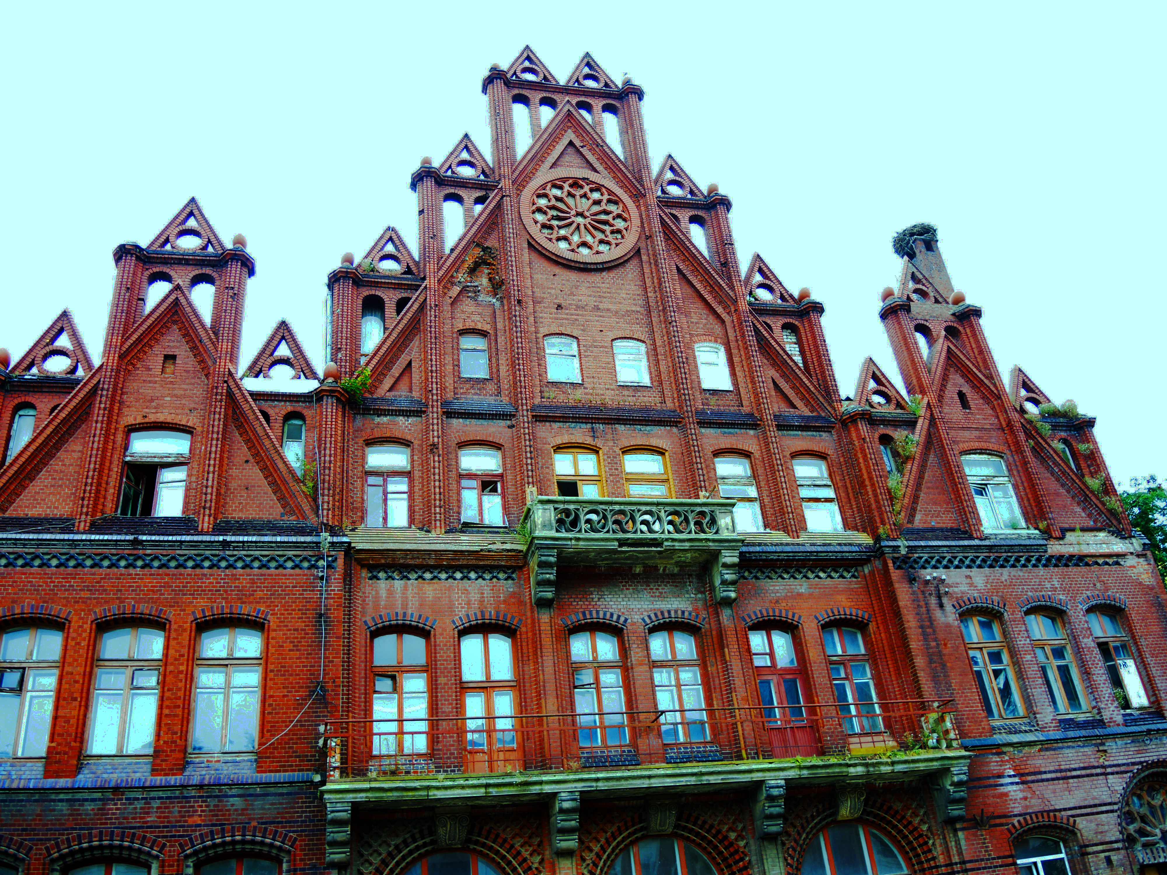 Здание народного банка: улица Алексея Толстого, 2, Гусев, Гусевский район, Калининградская область